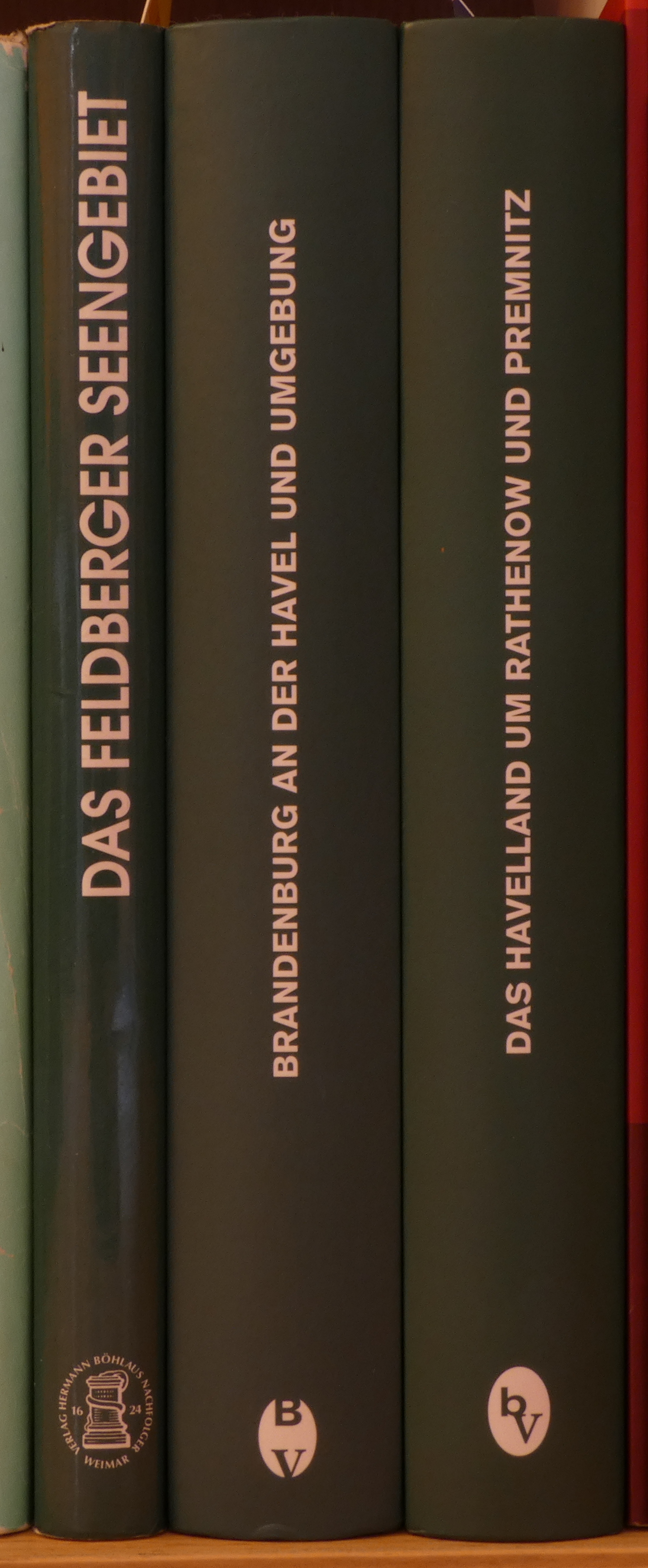 Werte der deutschen Heimat Buchrücken Böhlau